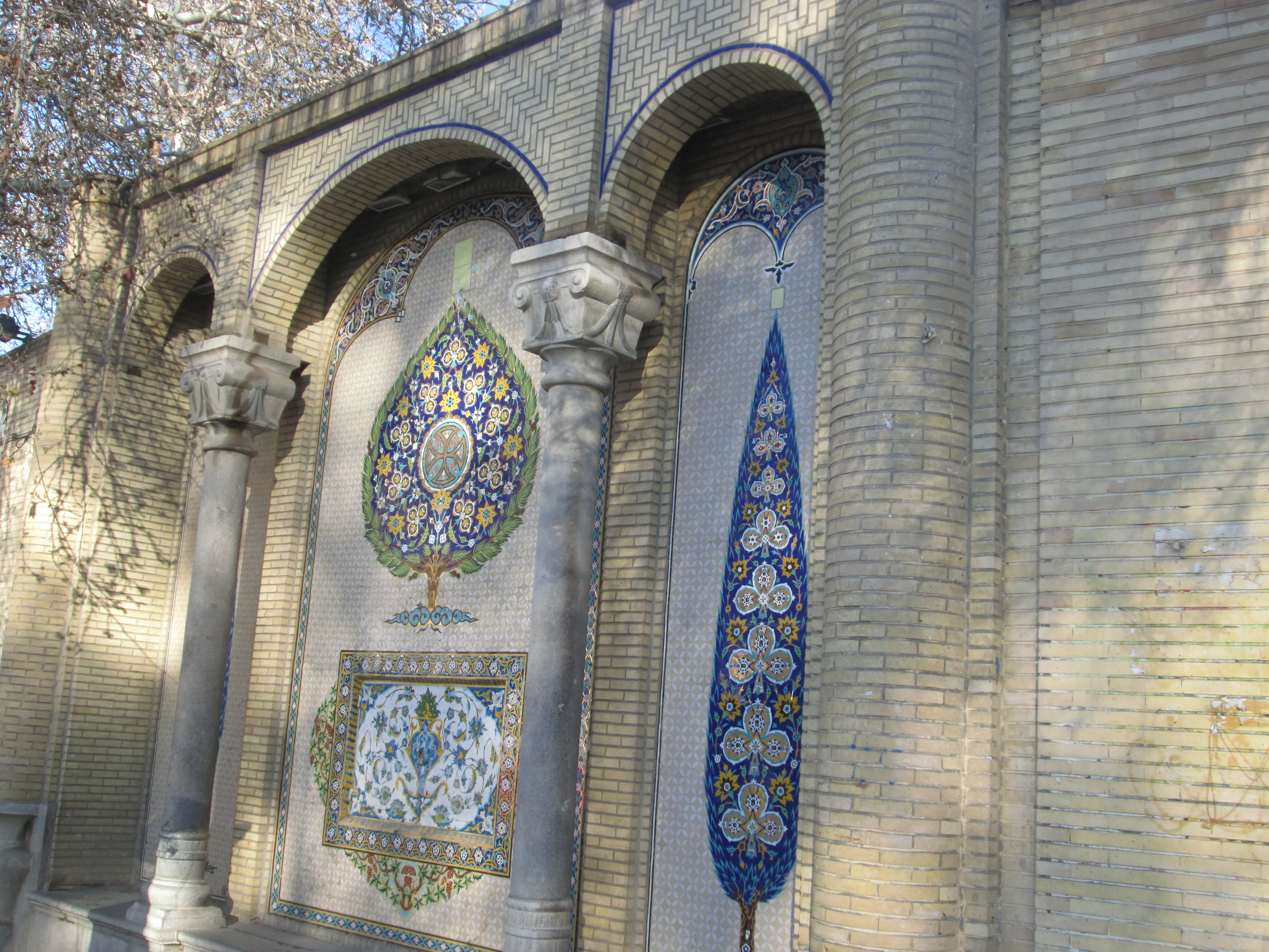 گوشه‌ی جنوب باختر بیمارستان مسیح، نبش چهارراه عباس آباد